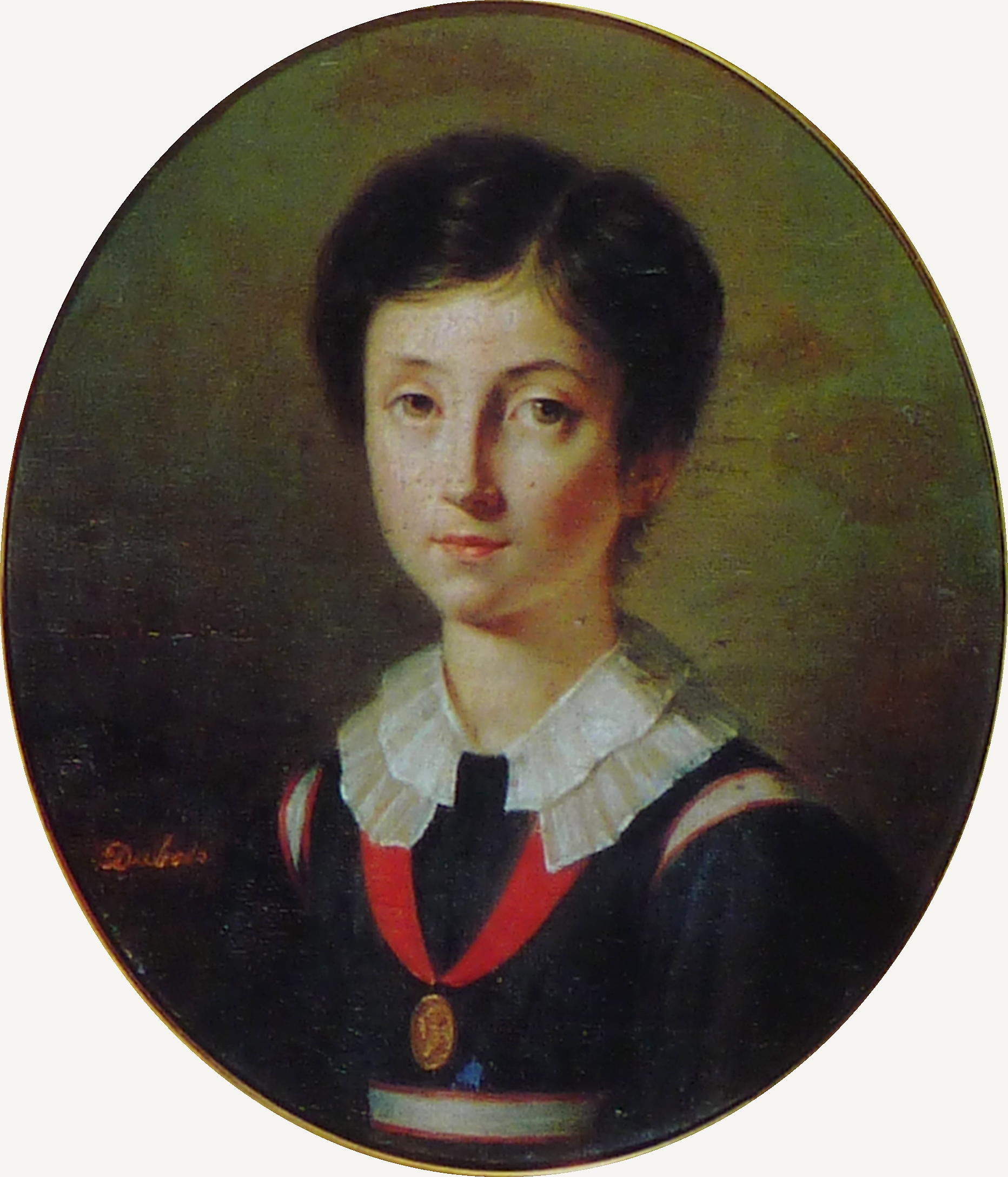 Portrait d'une élève de la Maison d’Éducation de la Légion d'Honneur de Saint-Denis, postérieur à 1811. Signature Dubois, peintre non déterminé. Lieu de conservation musée national de la Légion d'Honneur, Paris.